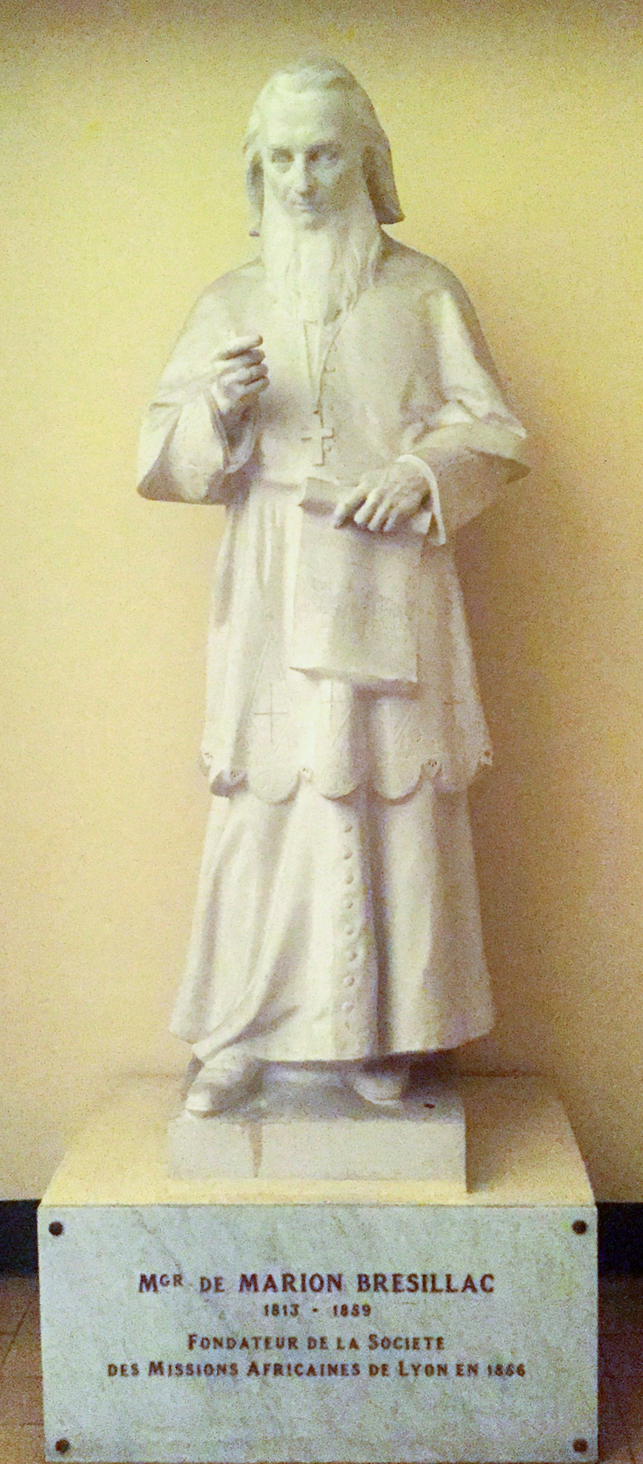 Musée africain de Lyon - statue de Melchior de Marion-Brésillac